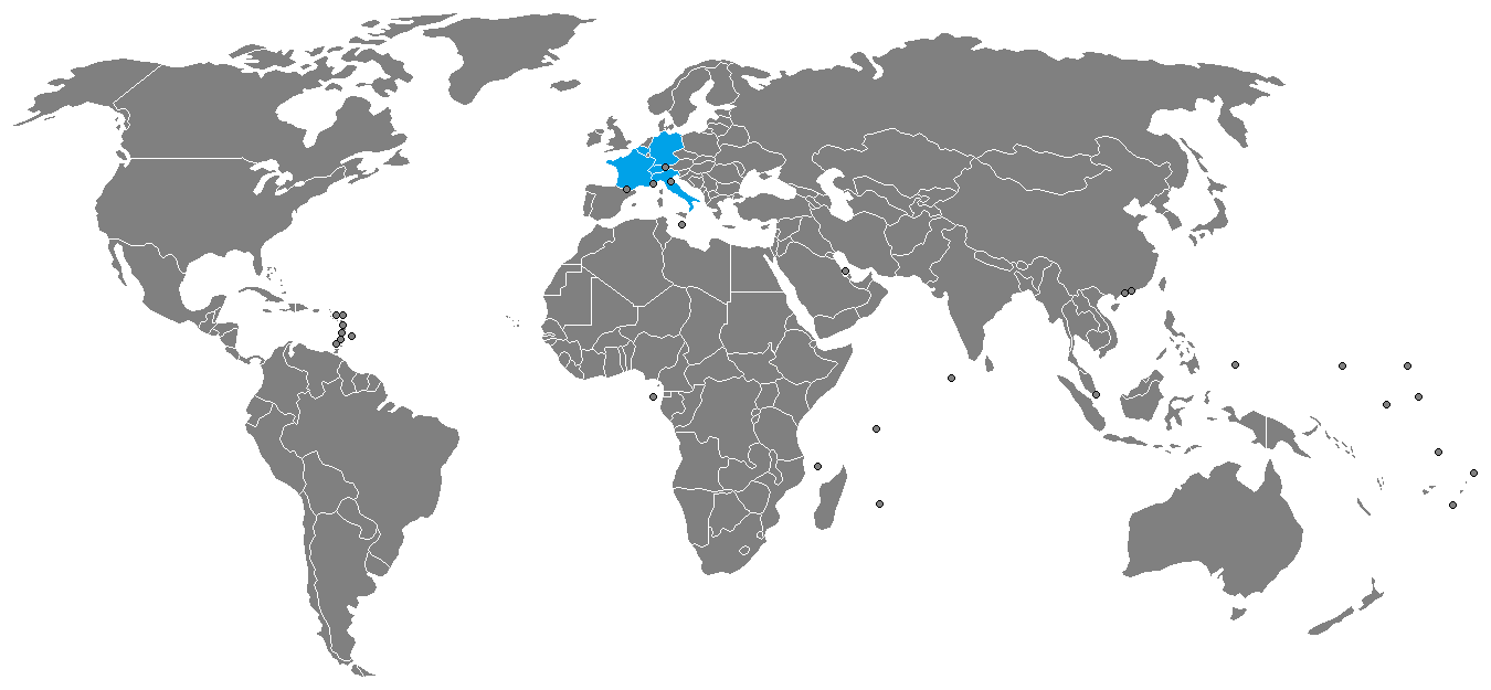 Kraje w których istnieją zgromadzenia Świeckiego Ruchu Przyjaciół Człowieka „Anioł Pański”